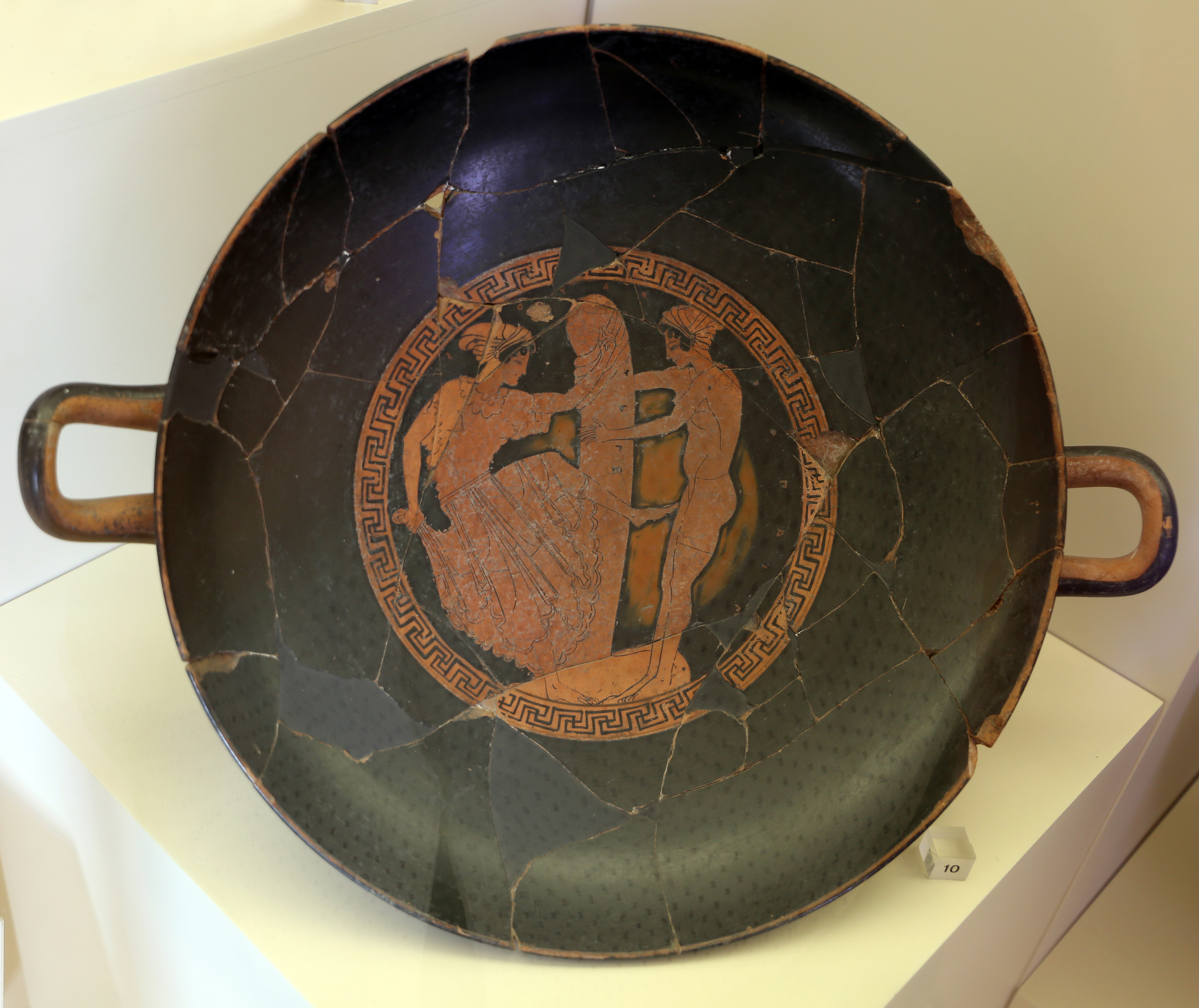 Museo nazionale etrusco di Villa Giulia This is a photo of a monument which is part of cultural heritage of Italy.